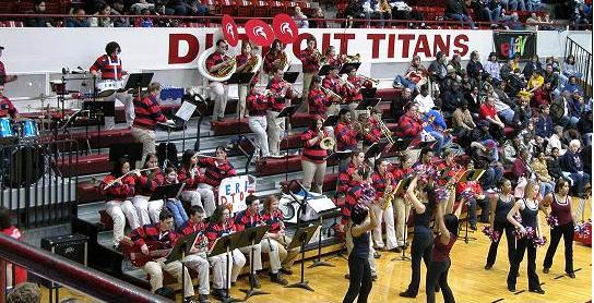 Titan Pep Band performing at Calihan Hall.